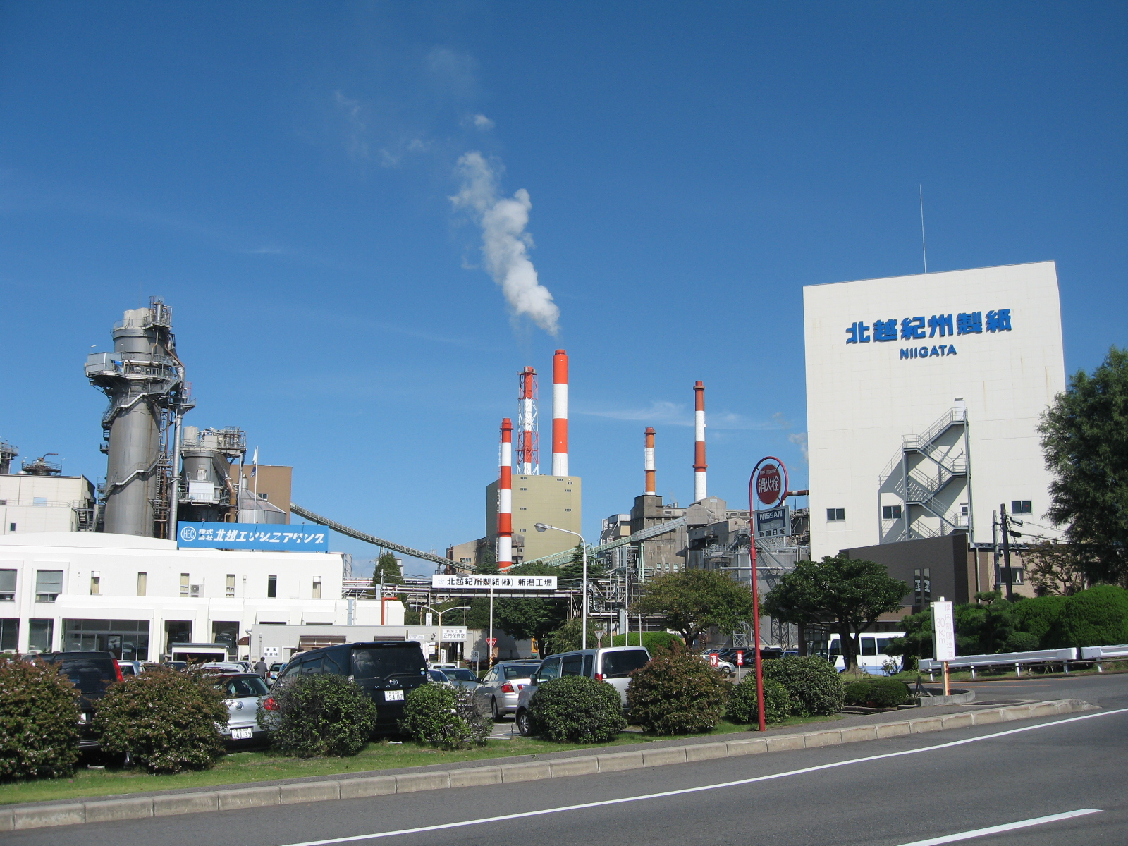 北越紀州製紙新潟工場の画像。